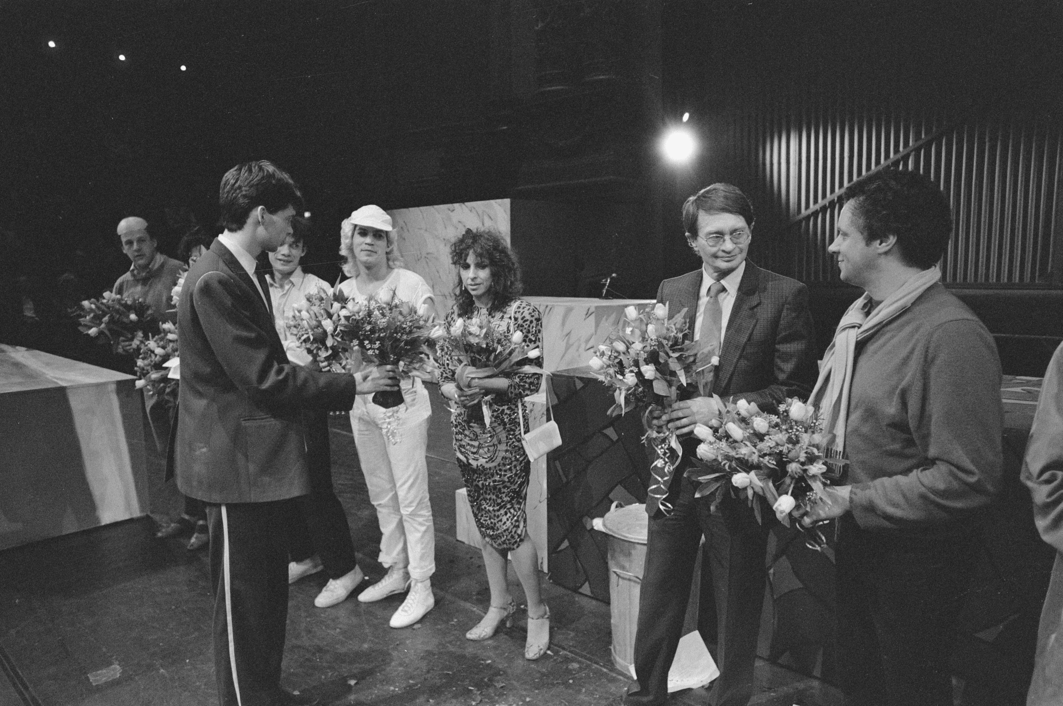 Collectie / Archief : Fotocollectie Anefo Reportage / Serie : [ onbekend ] Beschrijving : Boekenbal'85 in Carre in Amsterdam, voorstelling van werktheater 2 over boekenweekgeschenk Sombermansactie Datum : 20 maart 1985 Locatie : Amsterdam, Noord-Holland Trefwoorden : BLOEMEN, boekenbal, schrijvers, voorstellingen Persoonsnaam : Campert, Remco Fotograaf : Bogaerts, Rob / Anefo Auteursrechthebbende : Nationaal Archief Materiaalsoort : Negatief (zwart/wit) Nummer archiefinventaris : bekijk toegang 2.24.01.05 Bestanddeelnummer : 933-2711